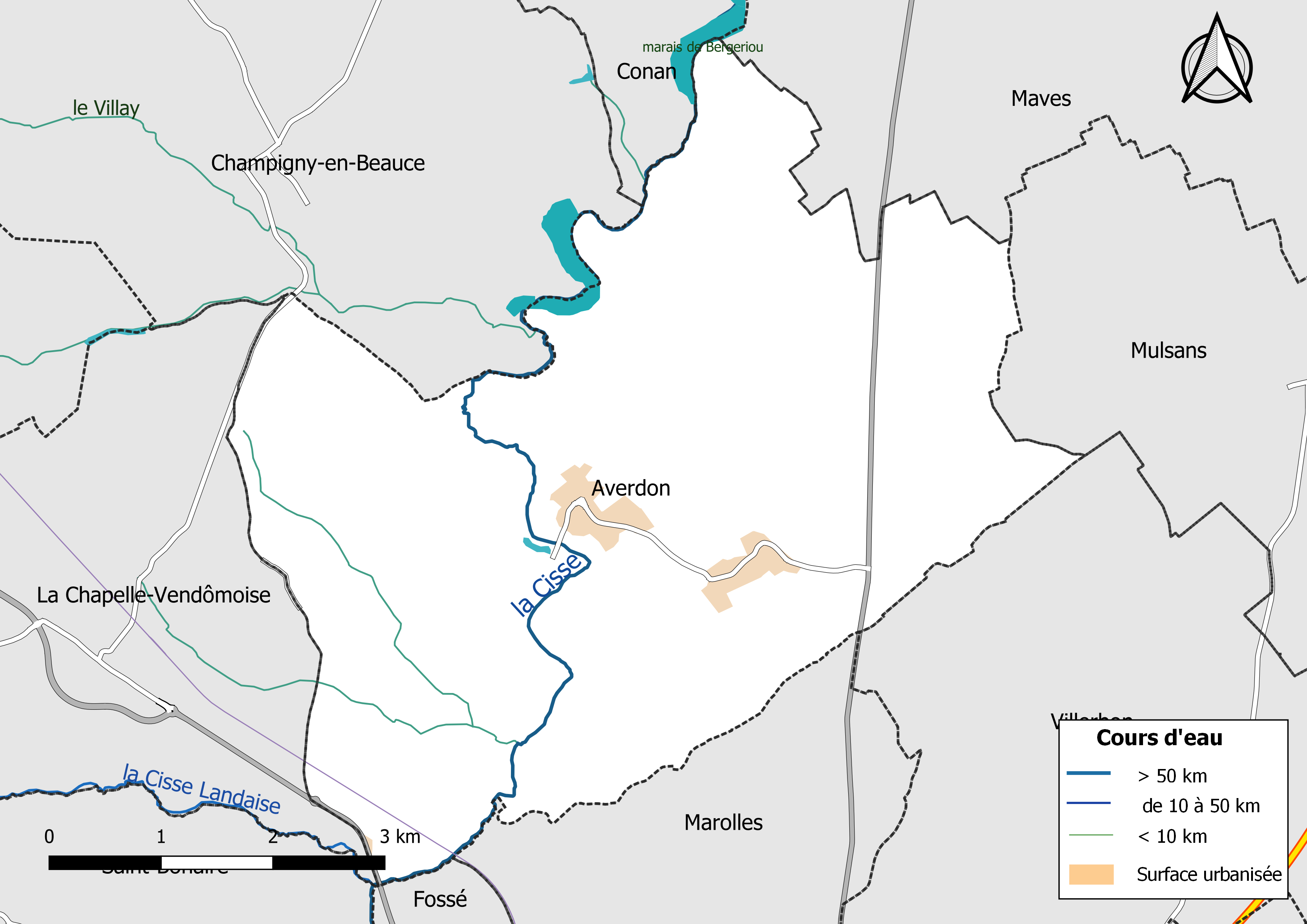 Carte du réseau hydrographique de la commune d'Averdon (France).